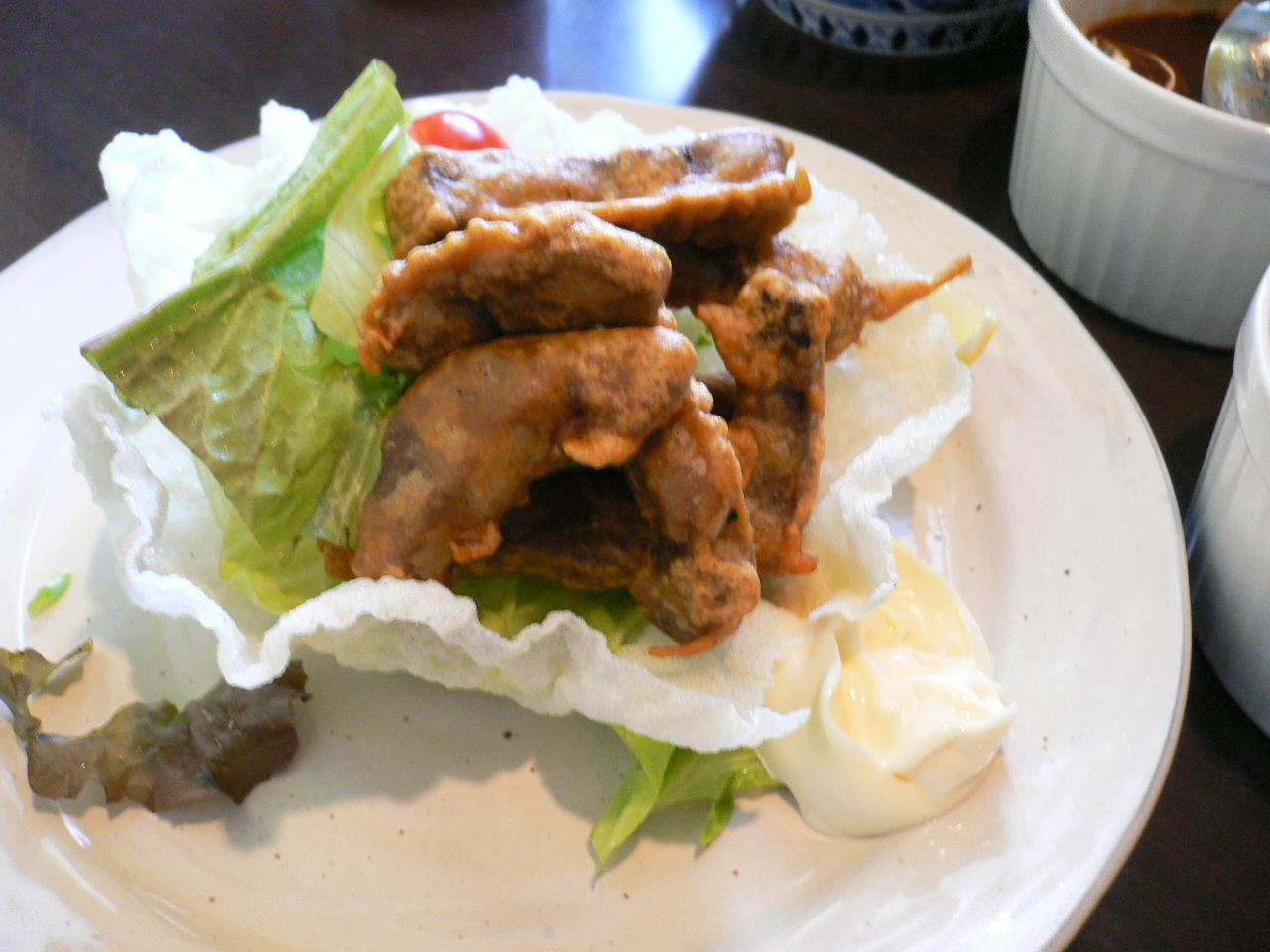 gyutan karaage